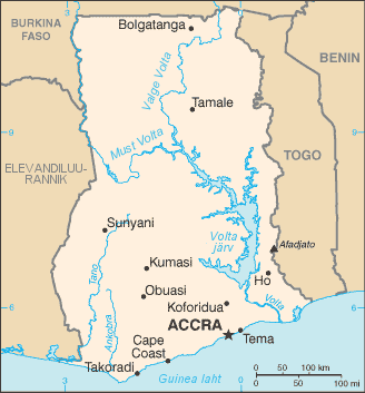 Ghana kaart